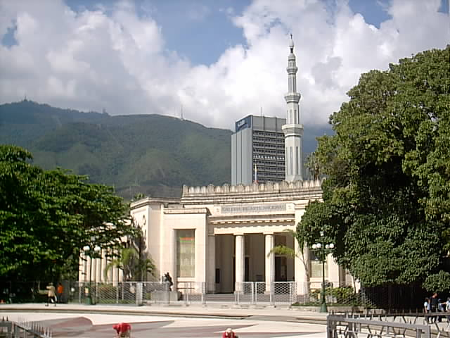 Galería de Arte Nacional, Mezquita Ibrahim Al-lbrahim y sede principal de CANTV.